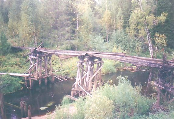 Старый мост через реку Ёртым, расположенный немногим ниже по течению, чем новый. Вид с правого берега реки в западном направлении.